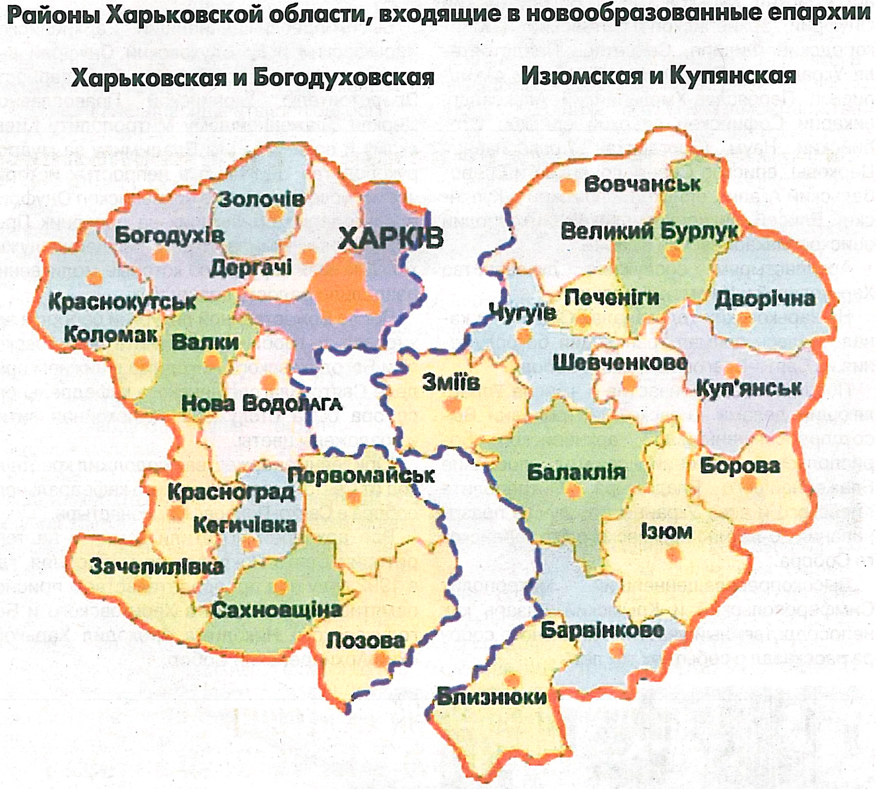 Разделение Харьковской и Богодуховской епархии на две: Харьковскую и Изюмскую. Границы от 20 июля 2012 (в этот день Дергачёвский и Золочевский районы переданы в Харьковскую епархию, а Барвенковский и Близнюковский районы - в Изюмскую).